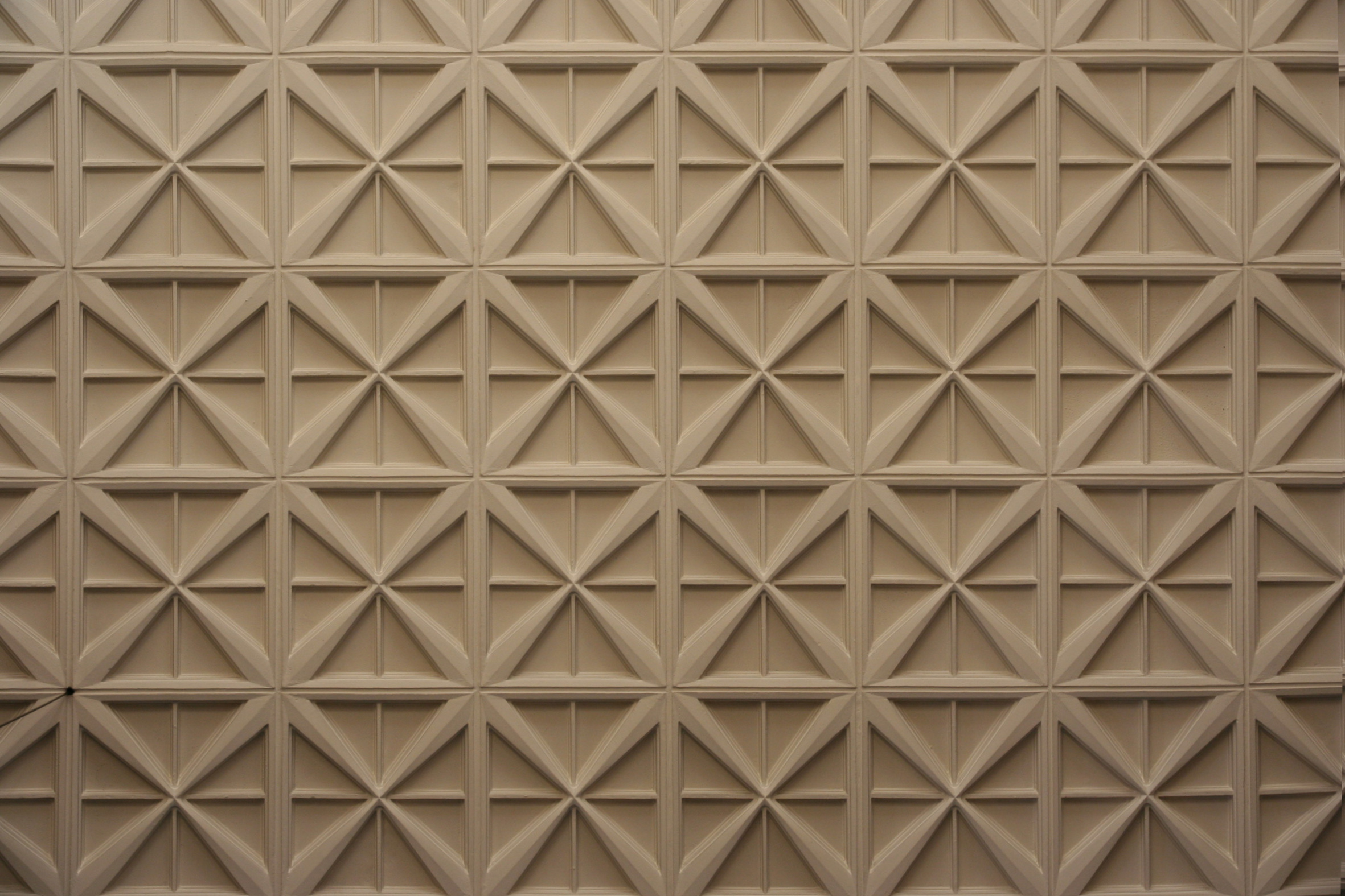 Römisch-Katholische Kirche St. Konrad Zürich-Albisrieden